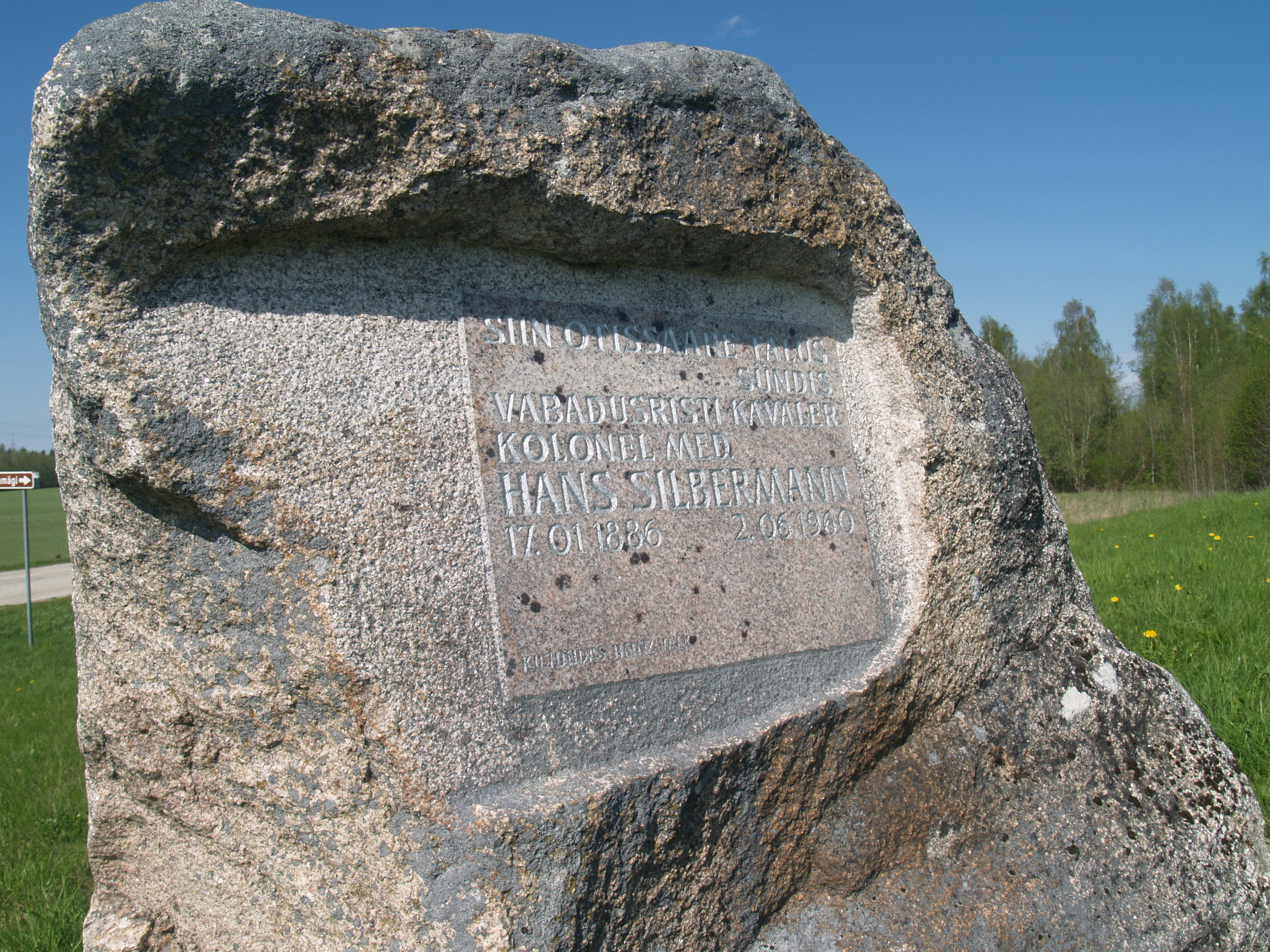 Mälestuskivi Hans Silbermannile Pajusi vallas